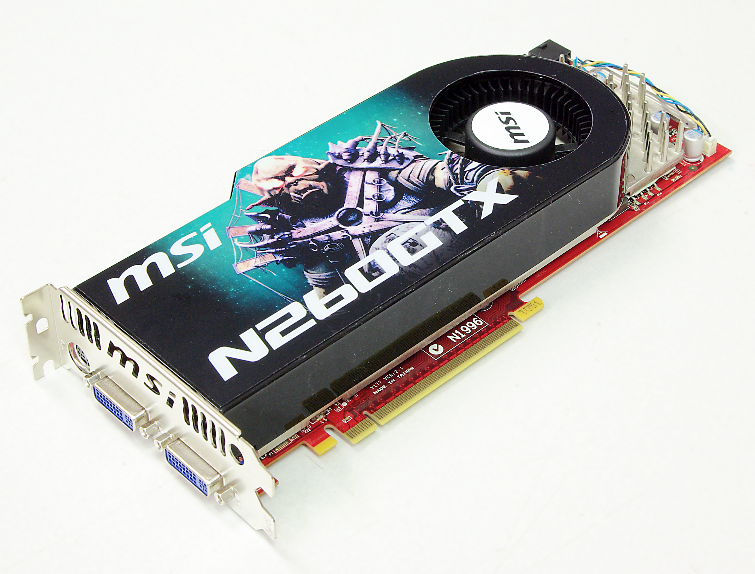 Grafikkarte für PCIe mit nvidia 260GTX